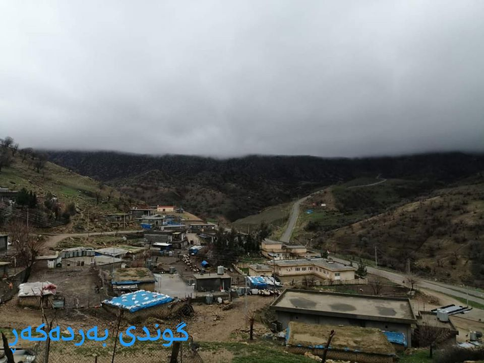 کوردی: گوندی بەردەکەڕ